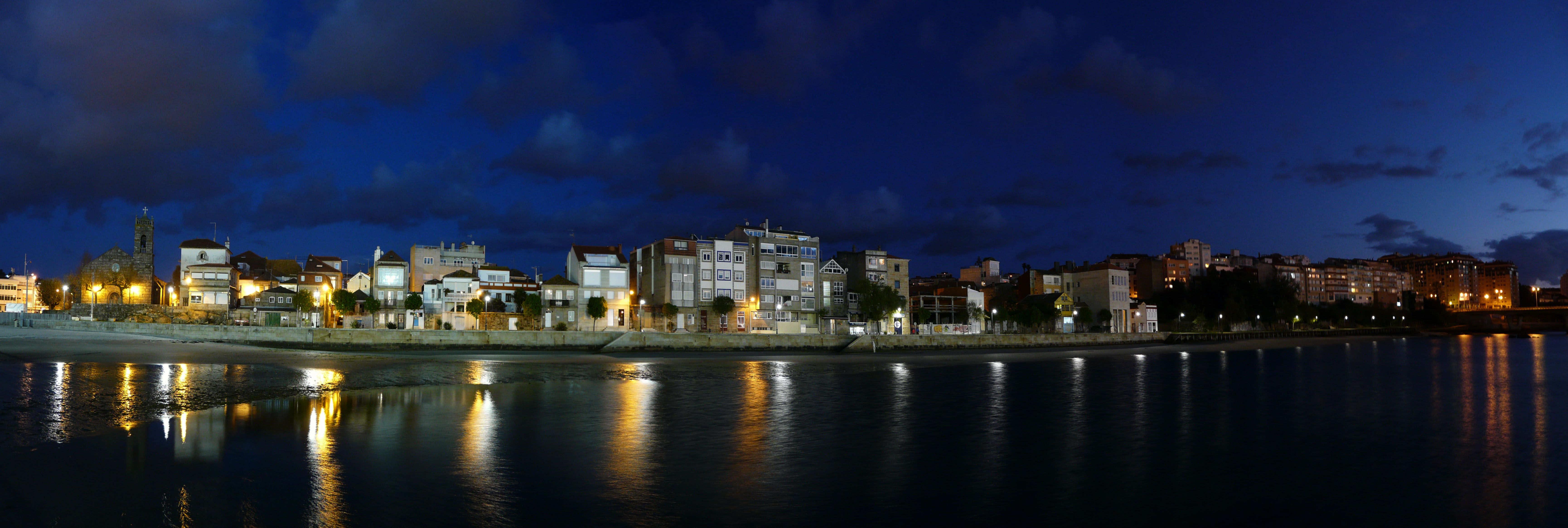 Bouzas, Vigo. Paseo de Valentín Paz-Andrade.